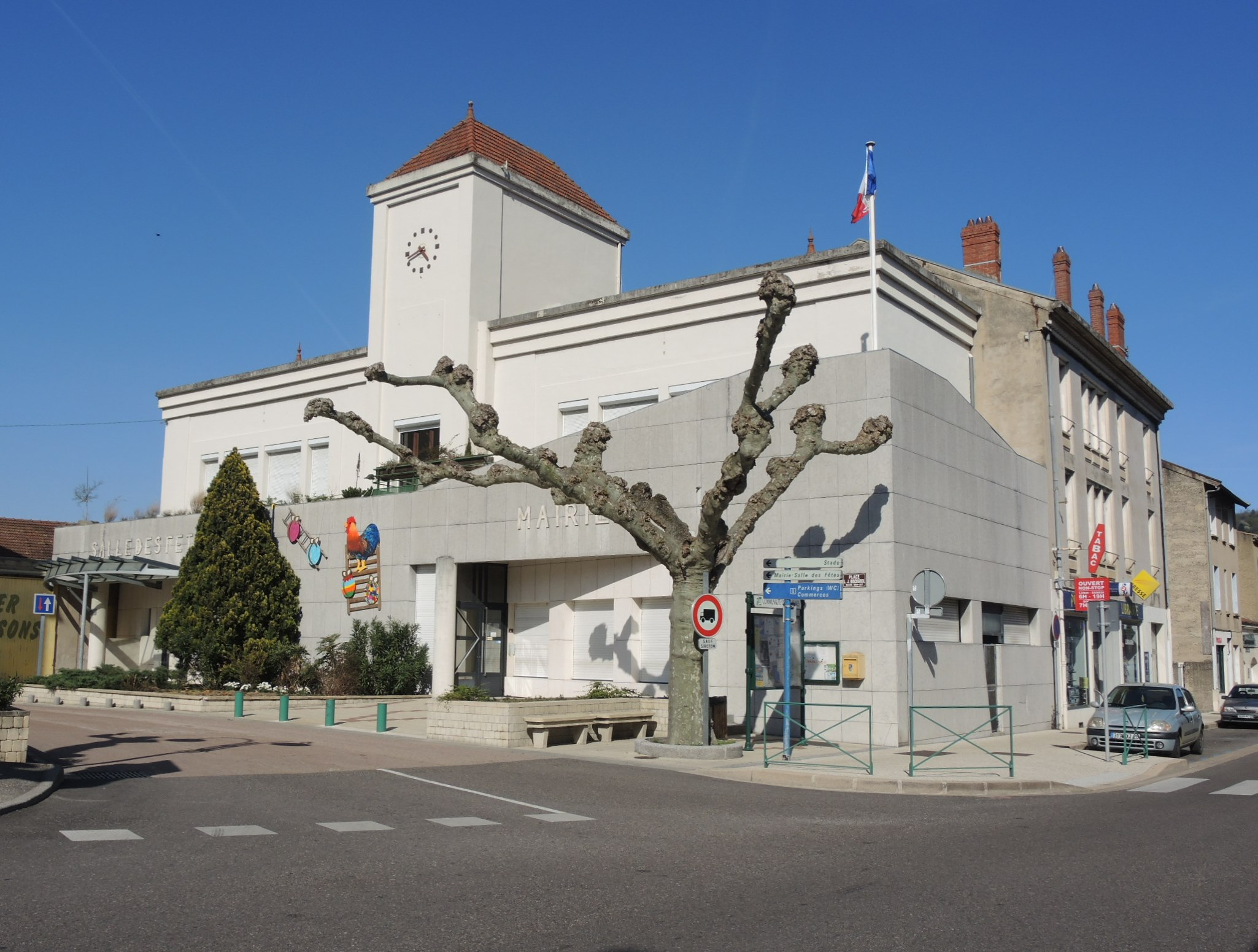 Sarras vue partielle